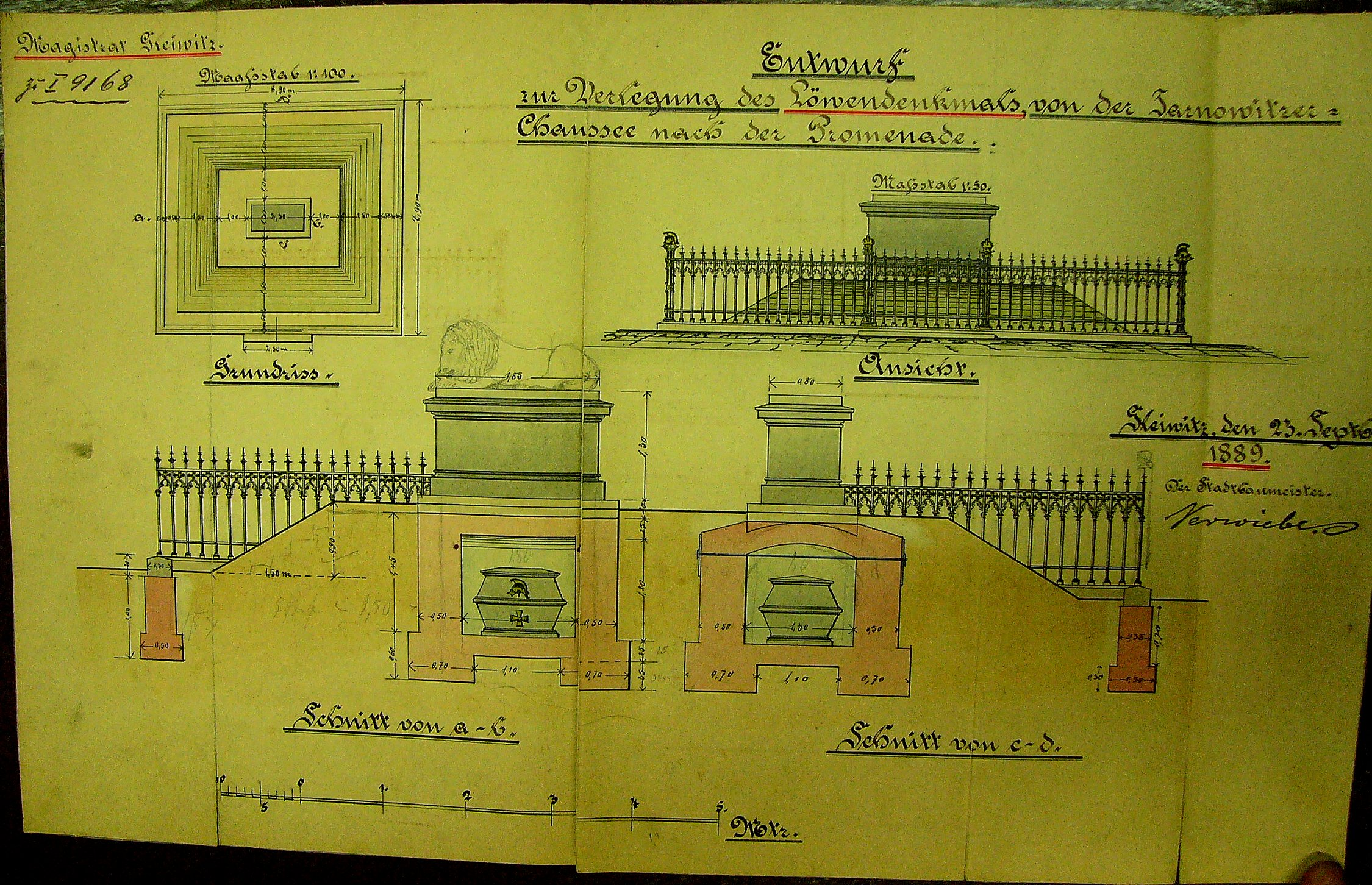 Foto eines alten Dokumentes von August 1890. Es zeigt das Blatt eins des Entwurfs zur Verlegung des Löwendenkmals in die Promenade in Gleiwitz. Das Dokument wurde von mir in den Räumen des Staatlichen Archivs in Kattowitz, Abteilung Gleiwitz fotografiert. Die Erlaubnis, die Fotografie auf Wikipedia zu veröffentlichen, wurde vom Leiter der Archiv-Abteilung erteilt.